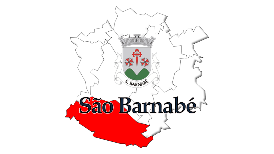 Evolução da População